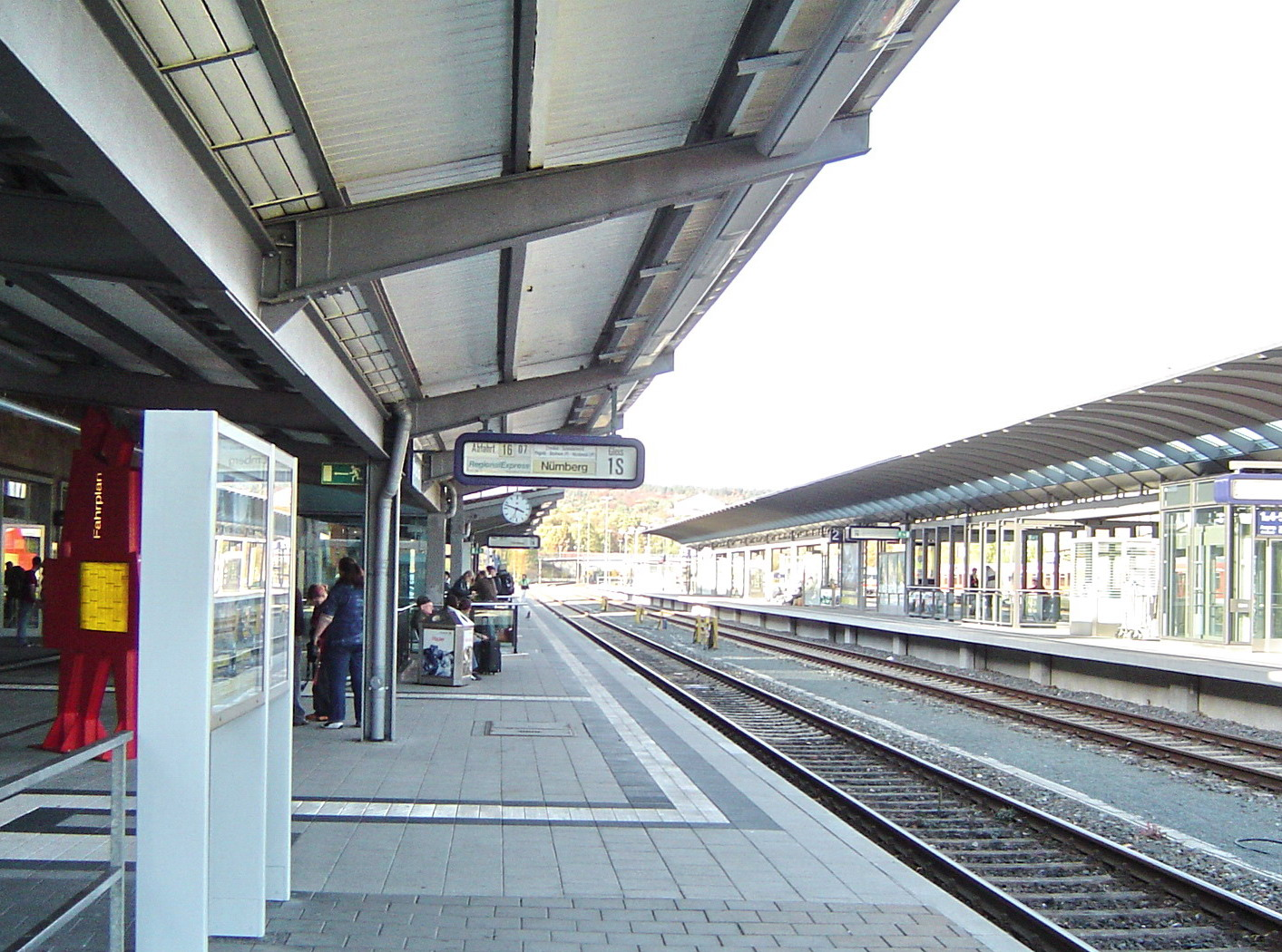 Bayreuth, Bahnhof, Bahnhofstr. 20